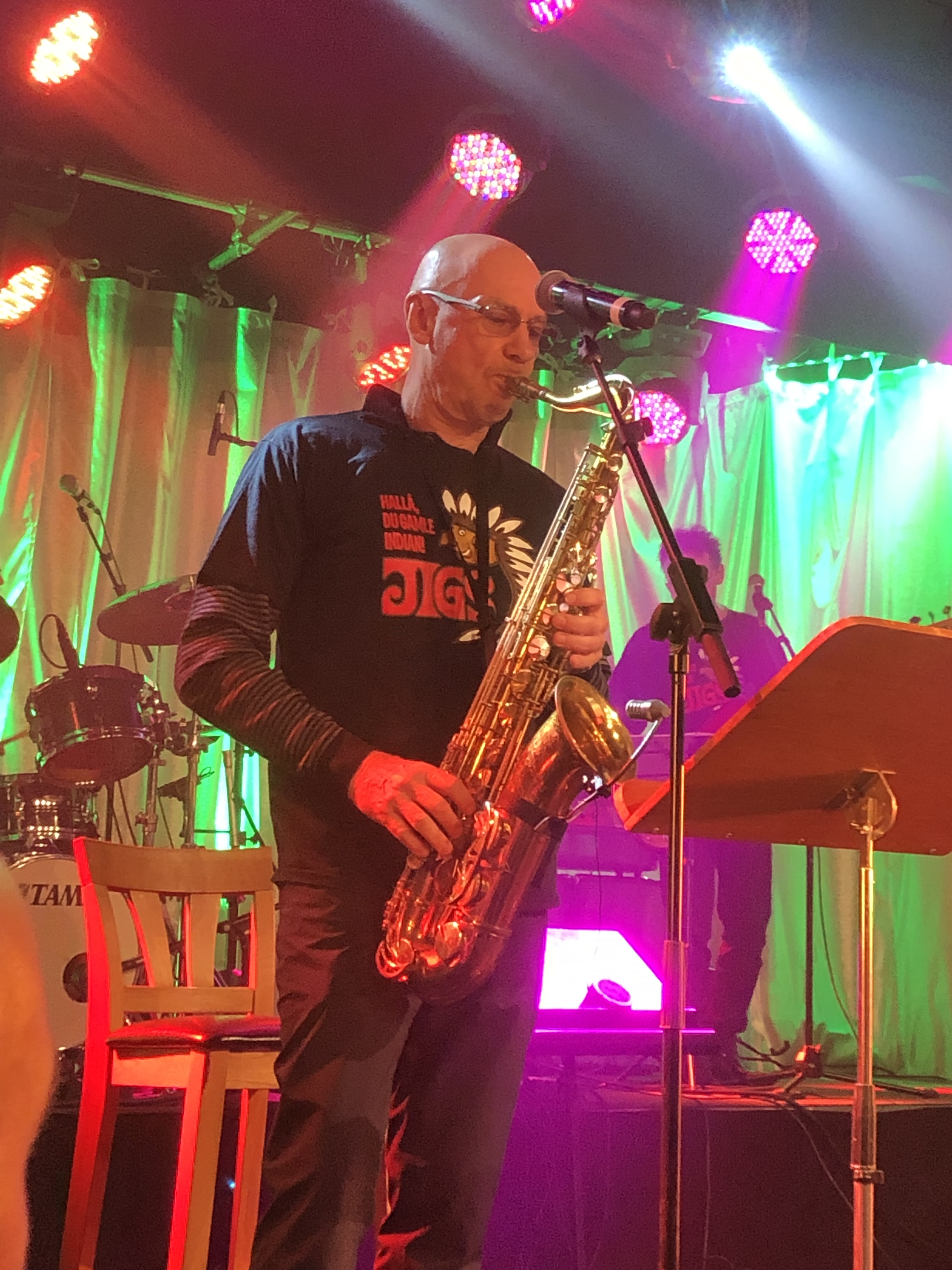 Anders Engberg spelar live med Jigs i Trollhättan, 2019. Foto: Johan Rosén